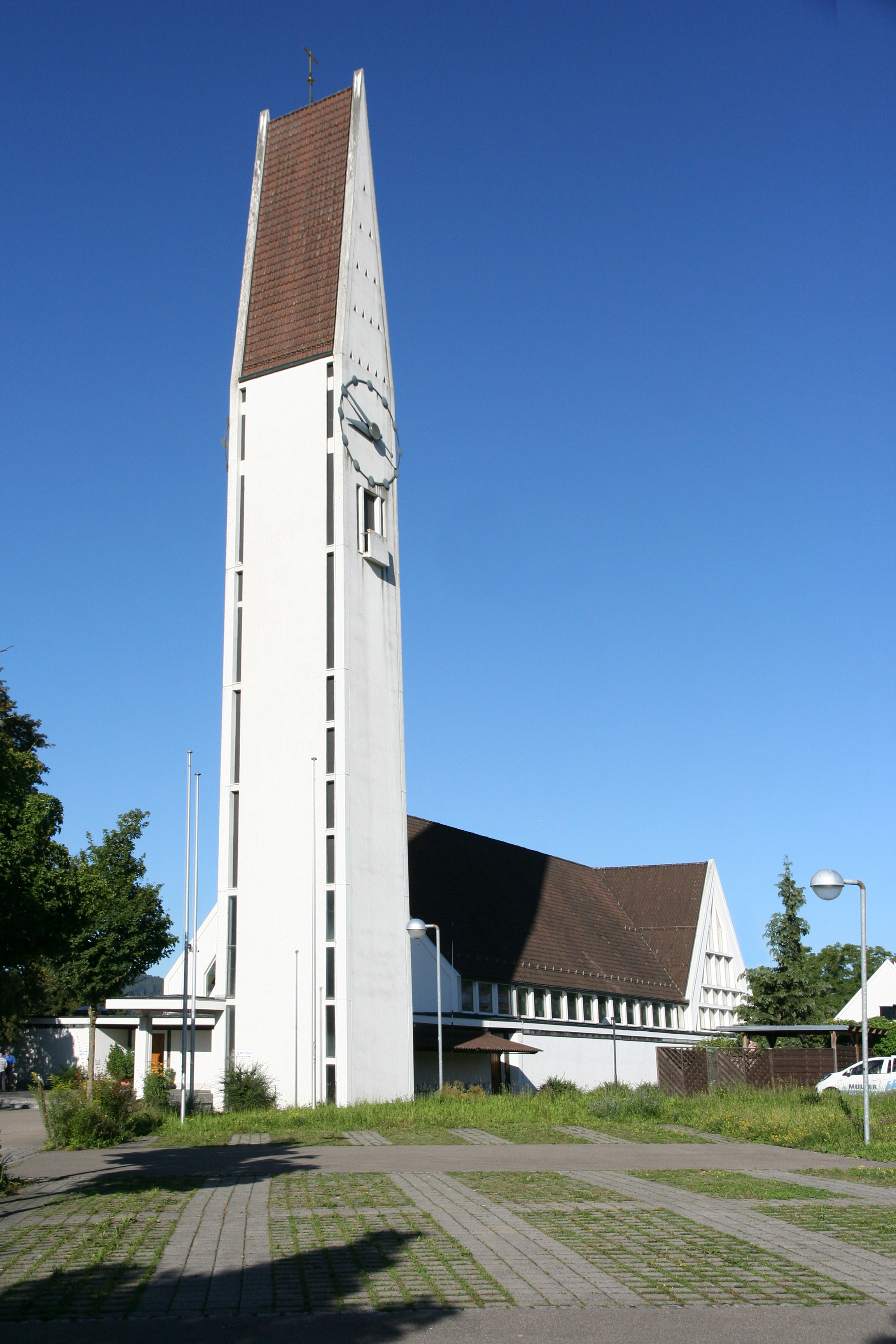 Röm.-kath. Kirche St. Johannes Wängi TG, Aussenaufnahme